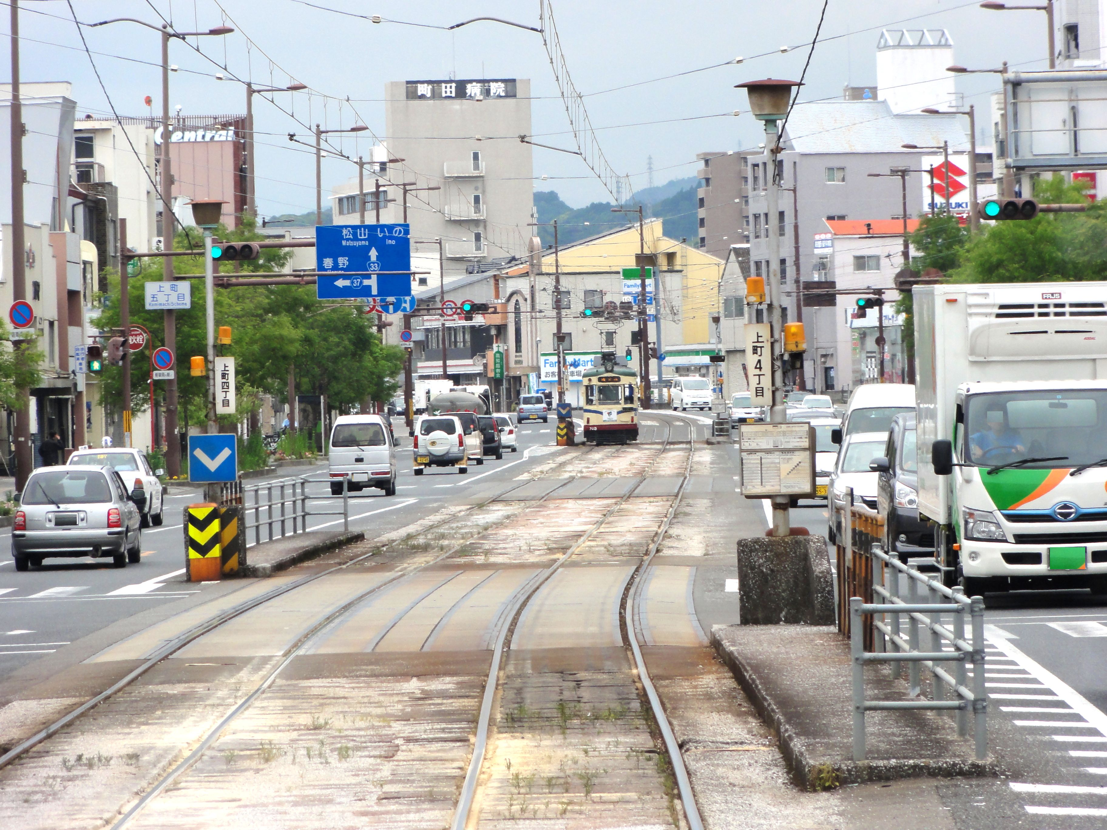 土佐電気鉄道上町四丁目電停。